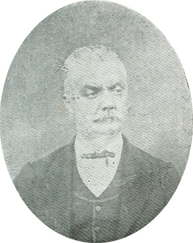 Портрет на Константин Мишайков.